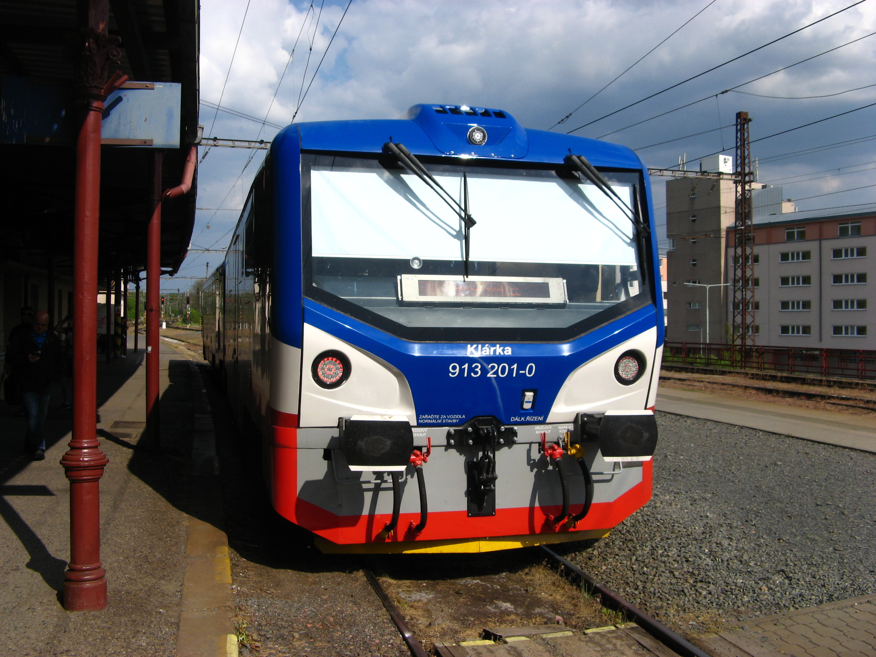 Motorový vůz 813.201 společnosti KŽC doprava ve stanici Praha-Vysočany